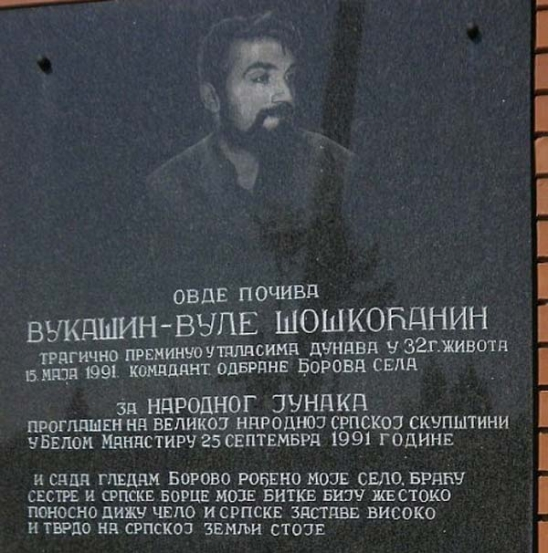 Srpski spomenik u Borovu Selu